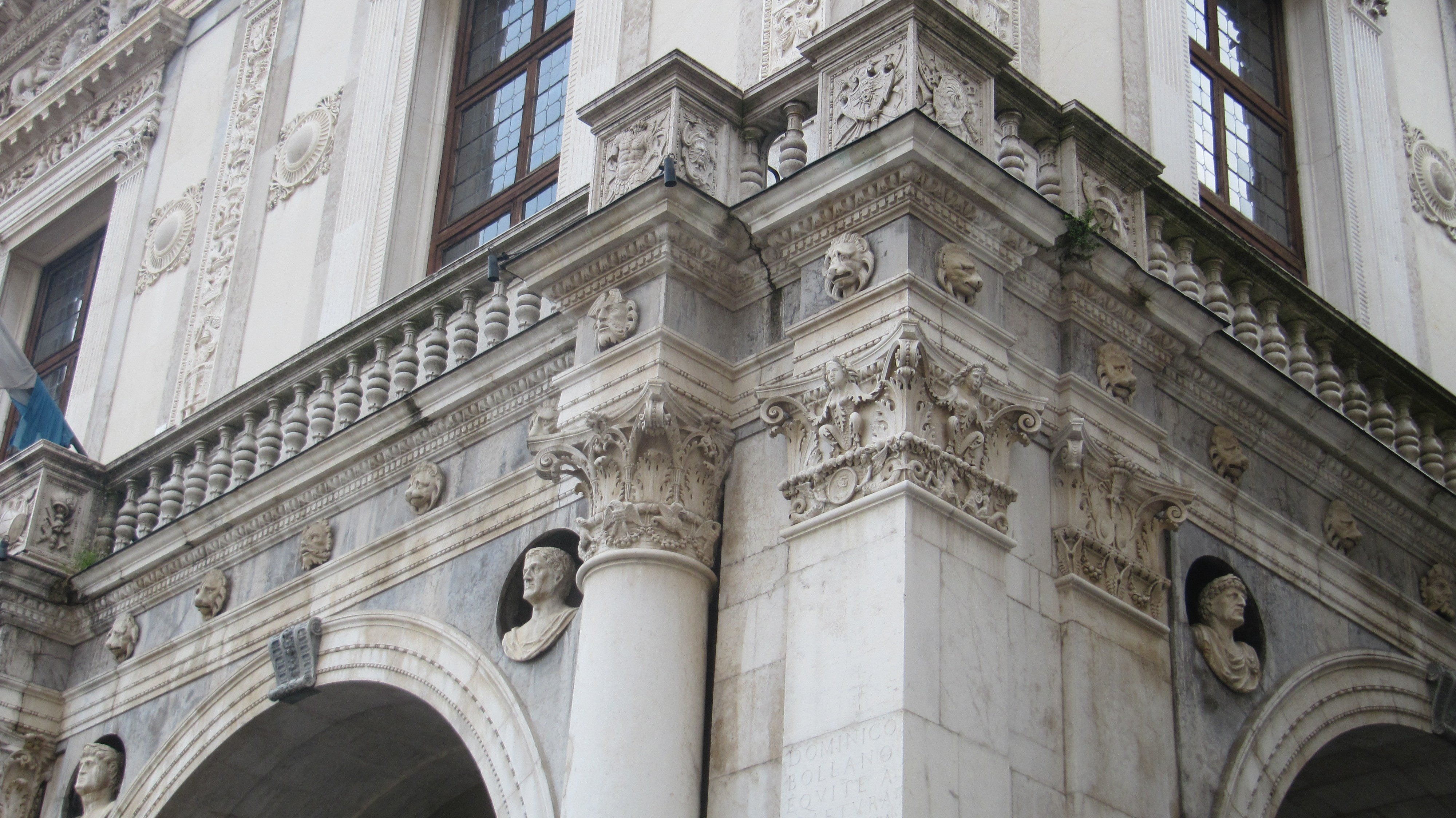 loggia di brescia (dettaglio, angolo nord-est)